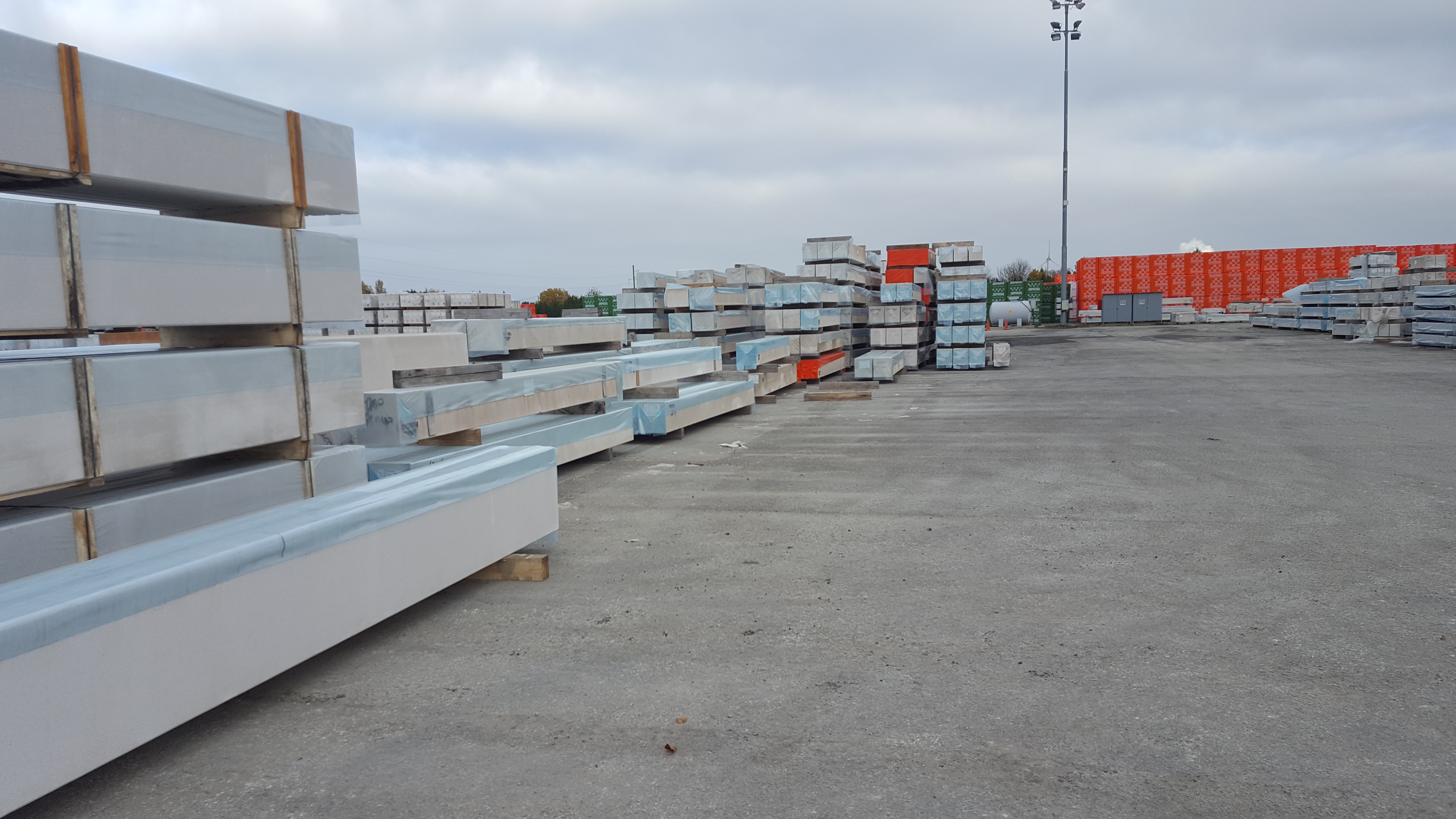 Kevytbetonielementit suojattuna odottamassa toimitusta